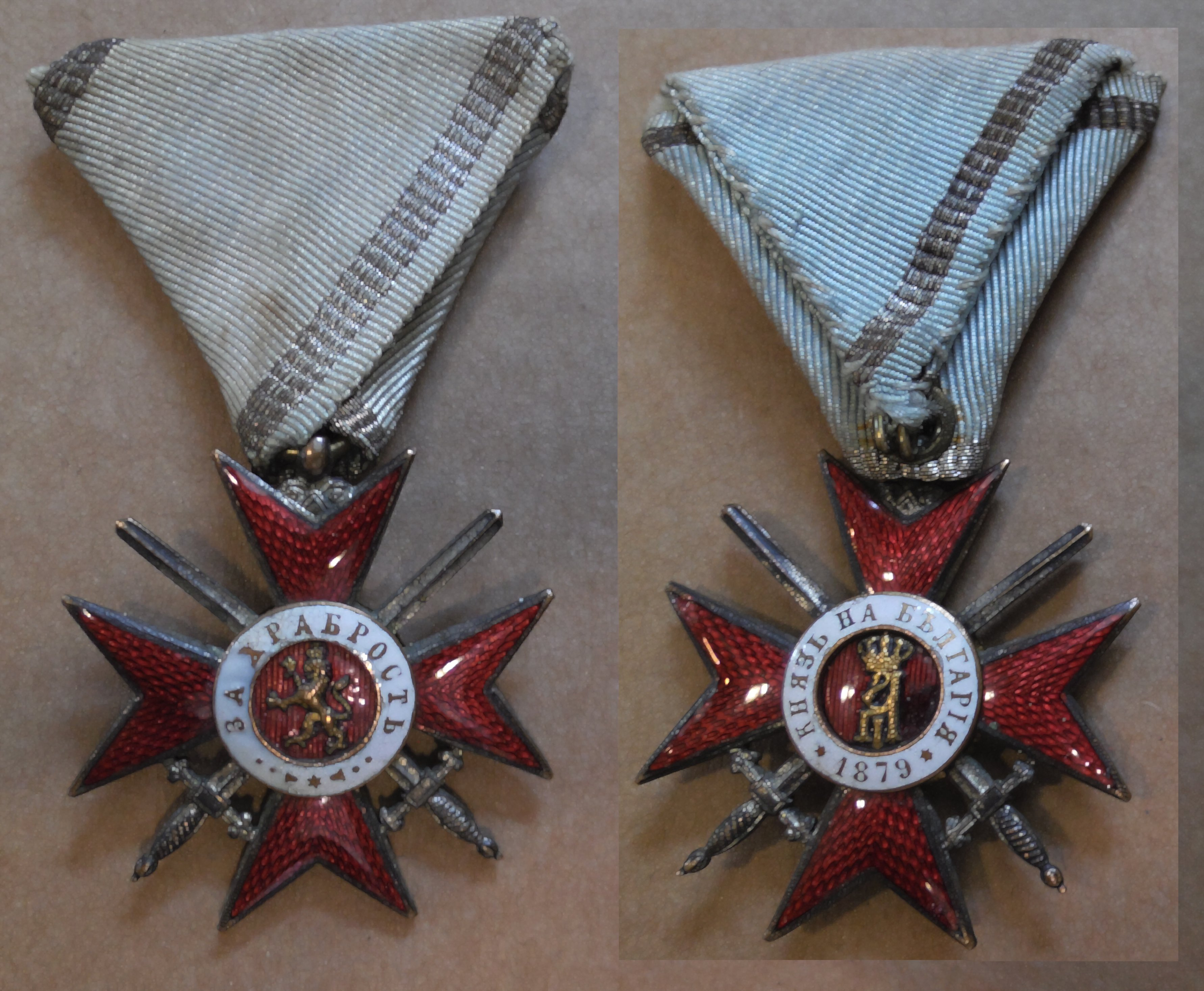 Von Fürst Alexander I. von Bulgarien 1880 gestiftetes Tapferkeitskreuz.